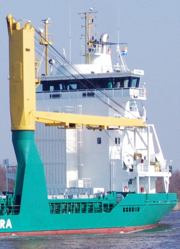 Das Frachtschiff M/V Timbus *IMO-Nummer: 9198680 *MMSI-Nummer: 211317180 *Rufzeichen: DIBC *Länge: 100.0m *Breite:17,0m *Flagge: Germany